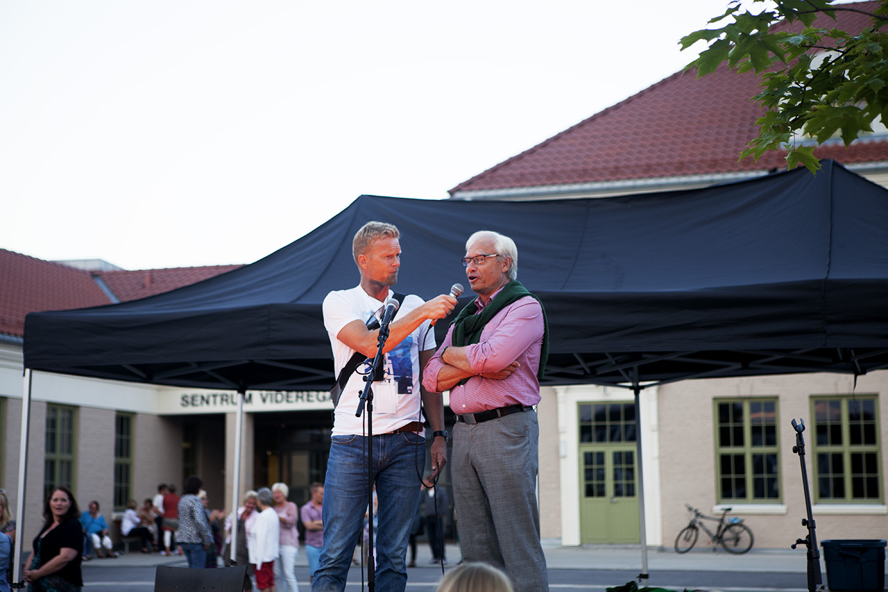 Dag tar seg en prat med ordfører Øystein Østgaard